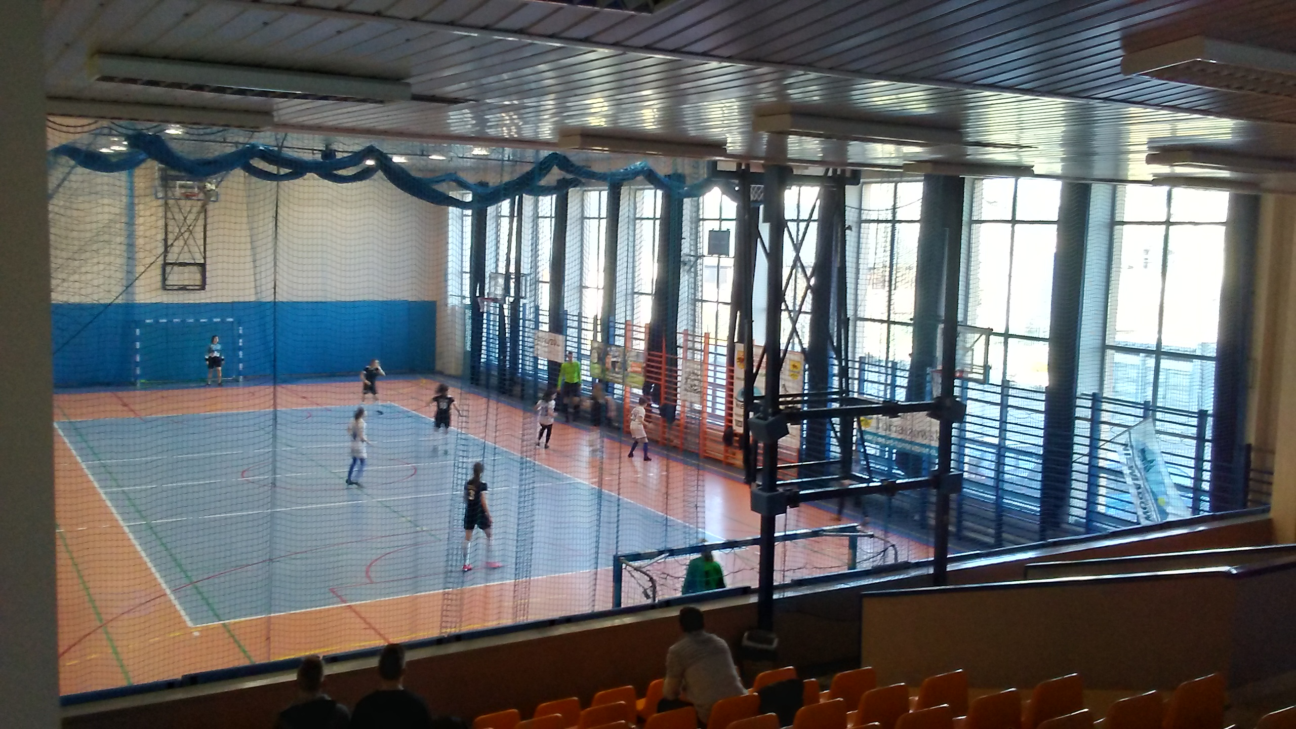 Hala sportowa ZSP 1 (Mechanik), Tomaszów Mazowiecki w województwie łódzkim, PL, EU, CC0